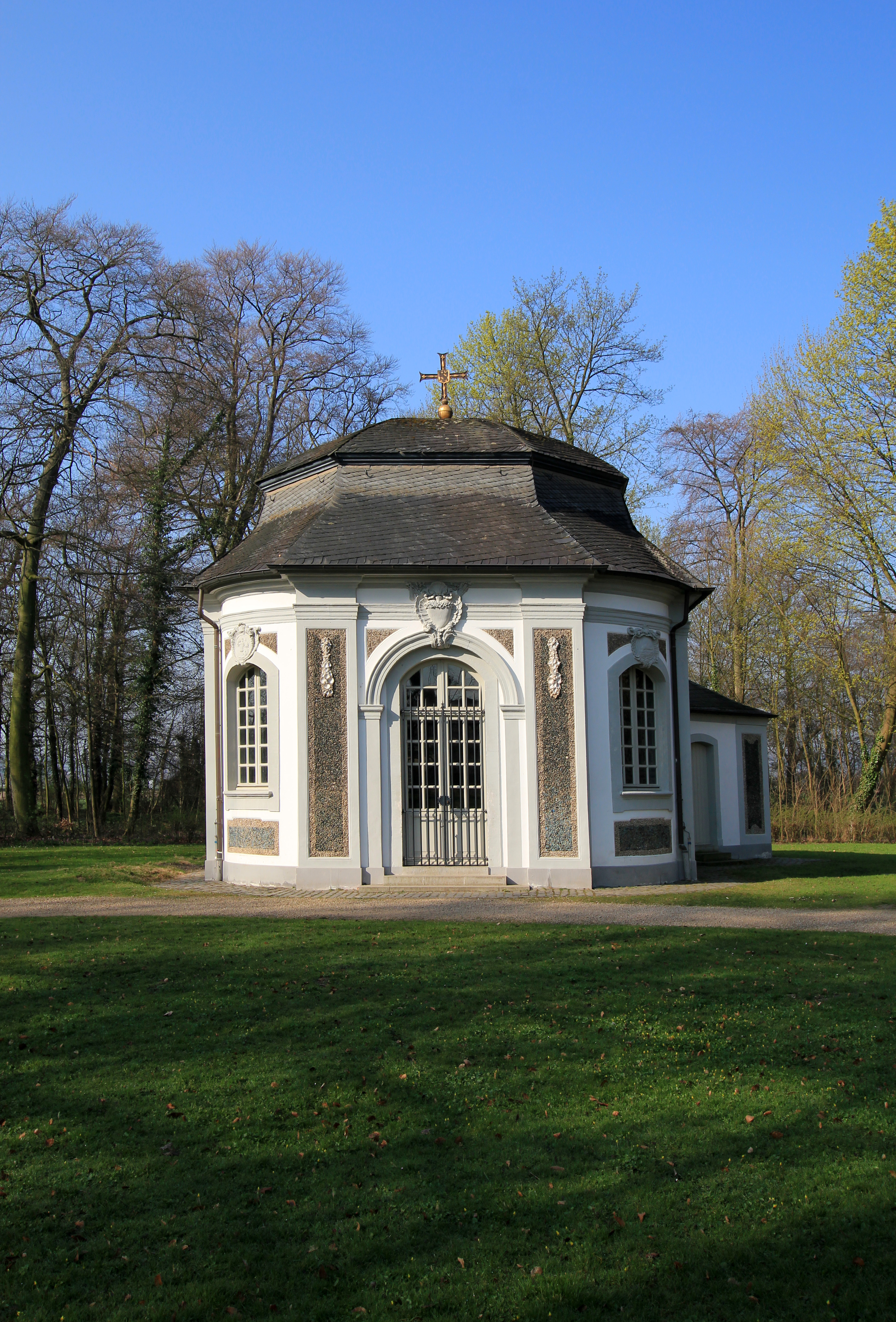 Brühl, Muschelkapelle am Jagdschloss Falkenlust